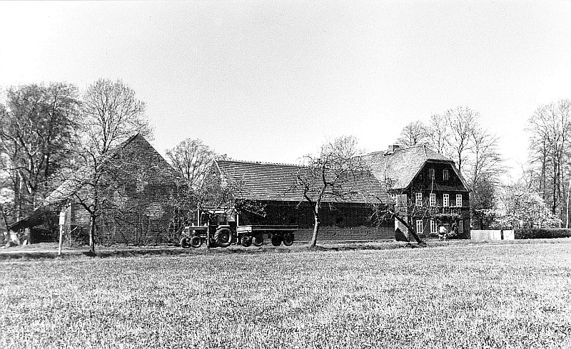 Original image description from the Deutsche Fotothek Hähnichen. Ehem. Wassermühle, Ansicht